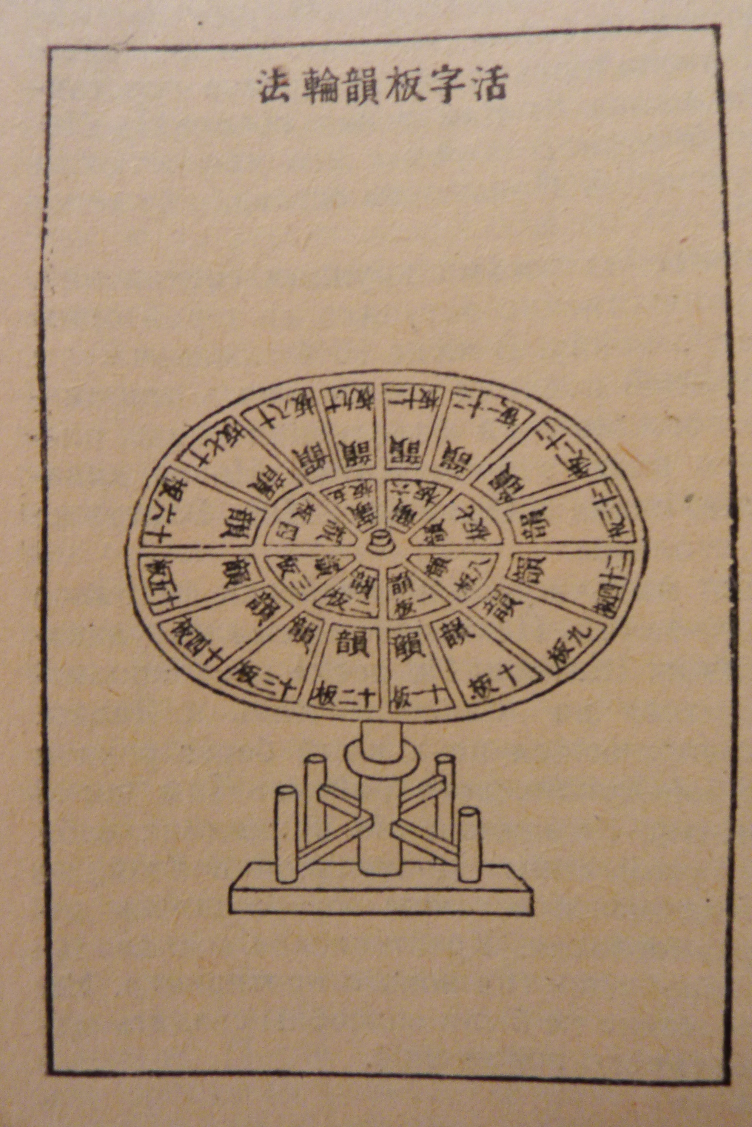 Каса набірного шрифту XII-XVстоліття